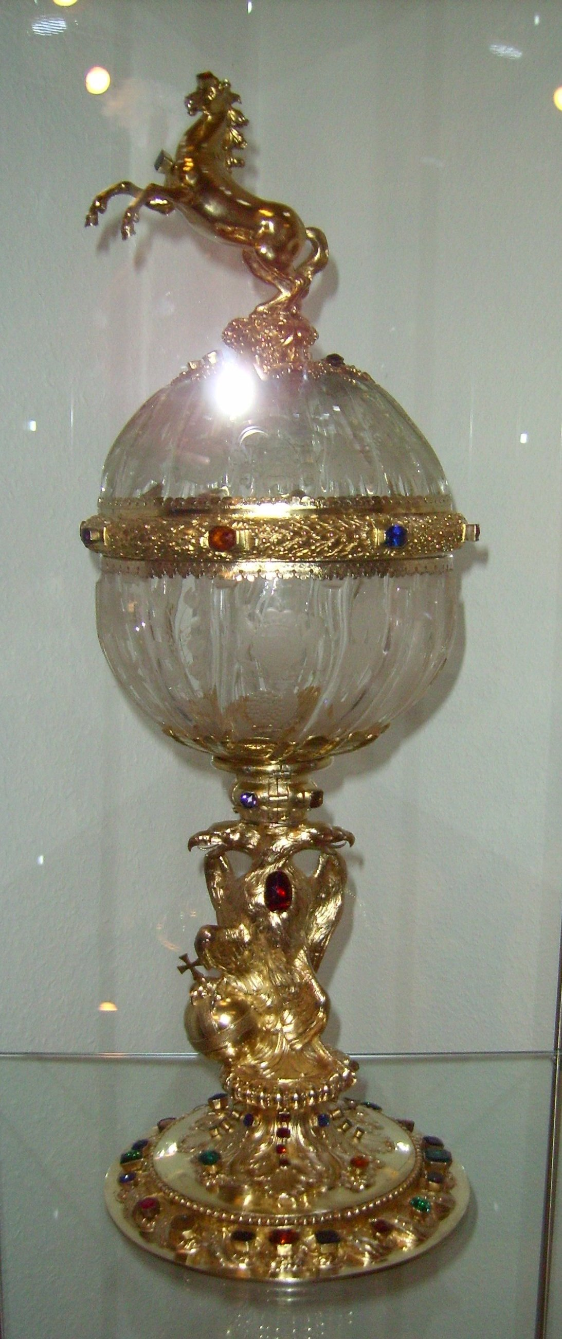 Westfälischer Landständepokal von 1667, unbekannter Goldschmied des 17. Jahrhunderts.